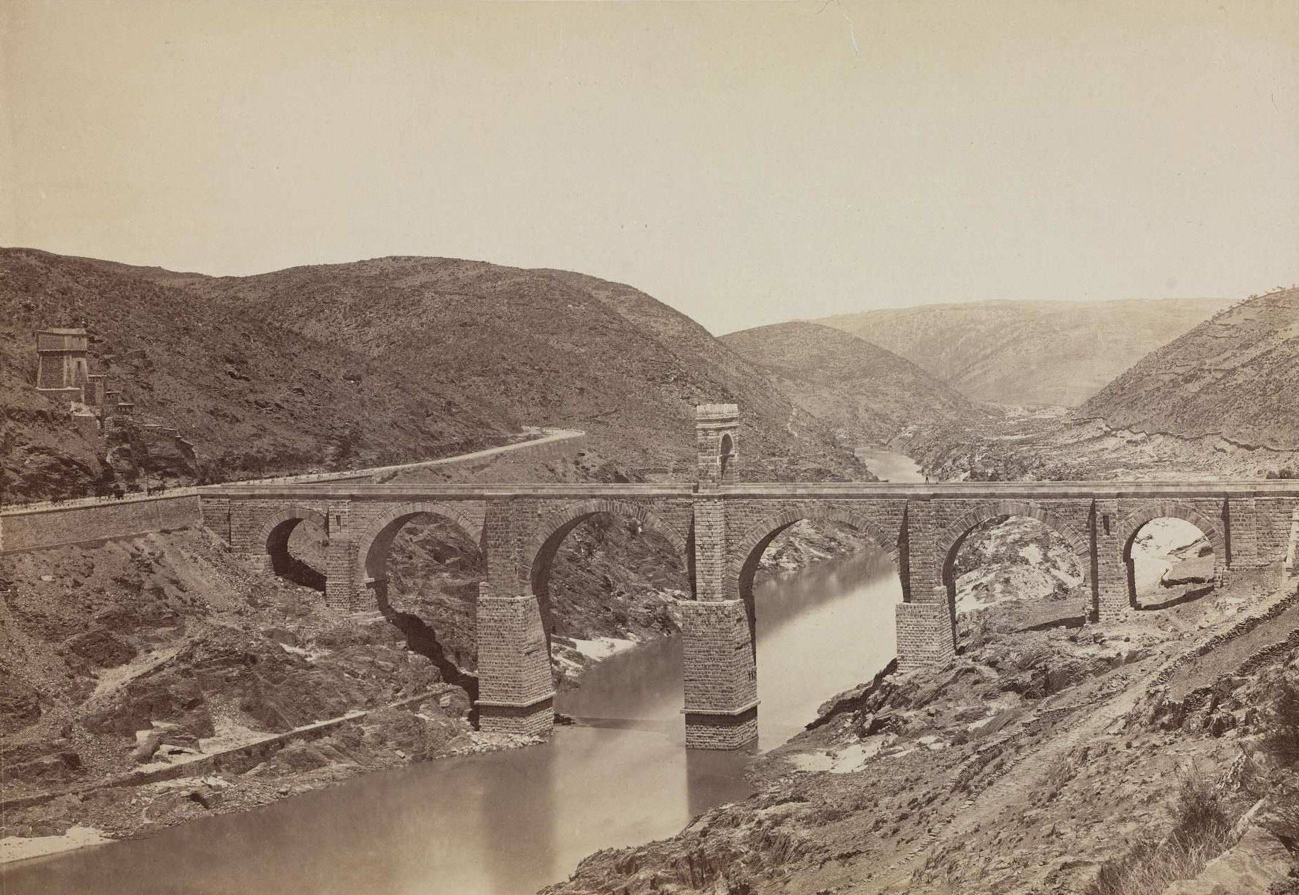 Alcántara, puente romano, J. Laurent y Cia. Madrid